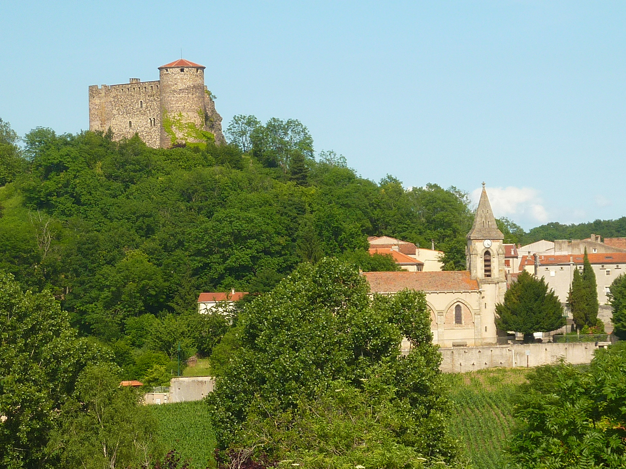 Château fort et village de Busséol